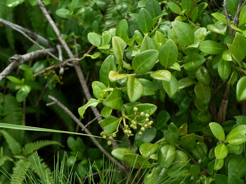 Psychotria serpens：シラタマカズラ 2008/08/12 沖縄本島：Okinawa Island, Japan